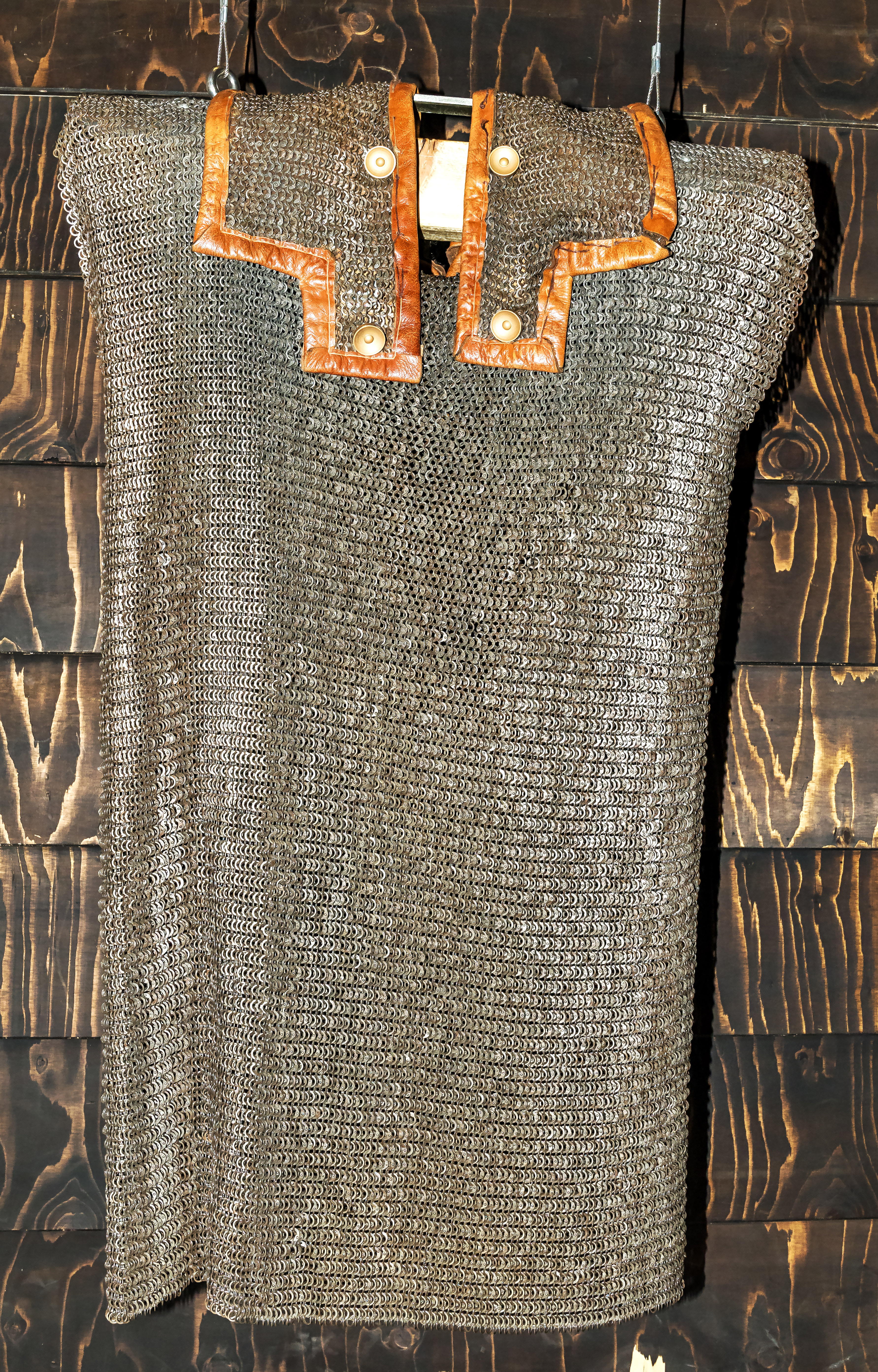 Moderne Nachbildung eines römischen Kettenhemdes mit Aufdopplung über die Schulter- und Nackenpartie. Das in der Festung Ehrenbreistein ausgestellte Kettenhemd hat ein Gewicht von 12 Kilogramm.